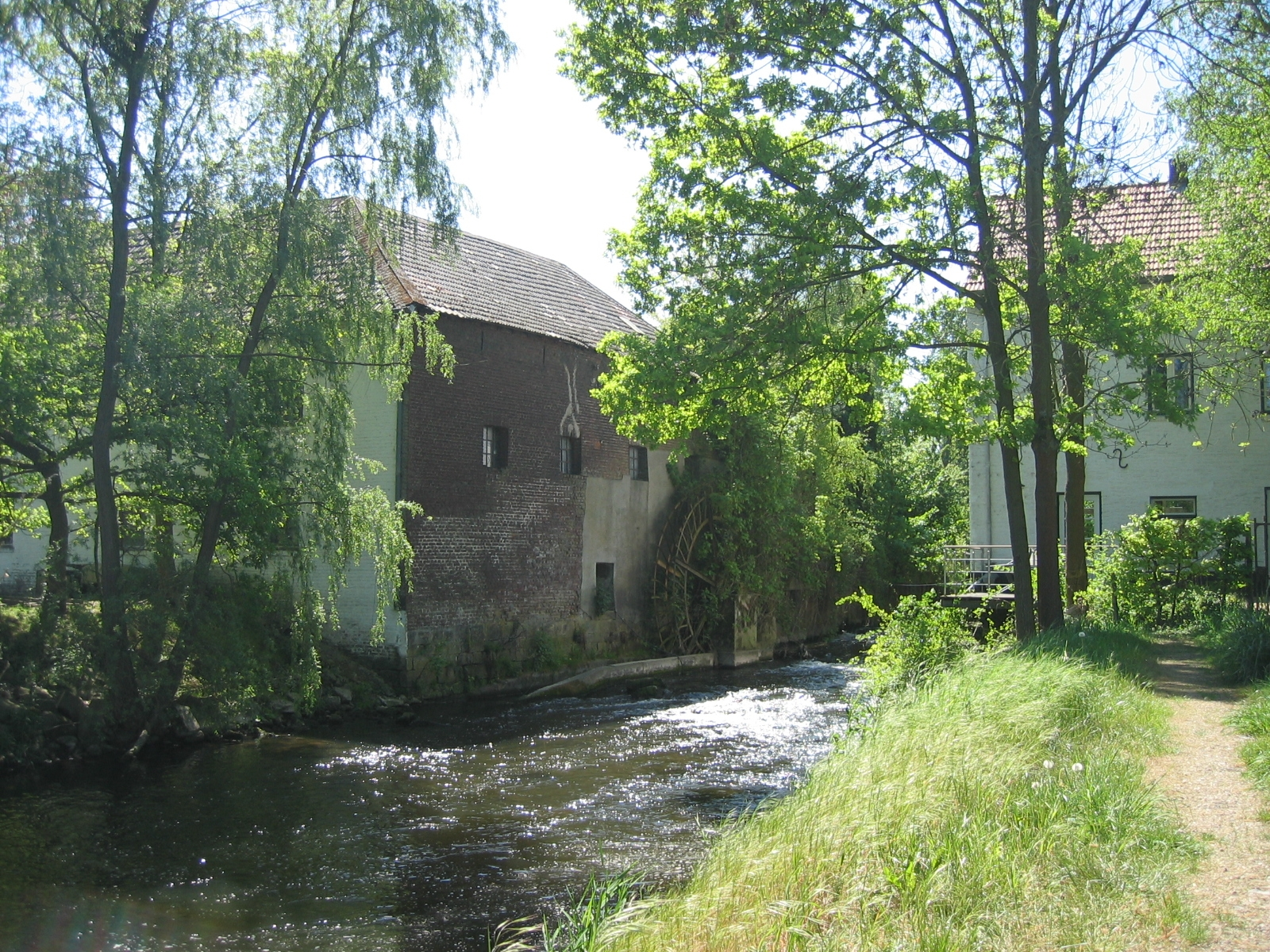 Zwei Mühlen bei Rimburg an der Wurm